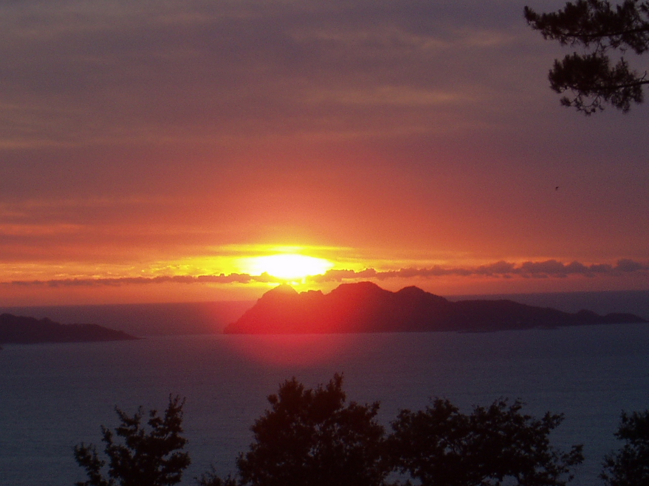 Solpor na ría de Vigo coas Illas Cíes ao fondo.